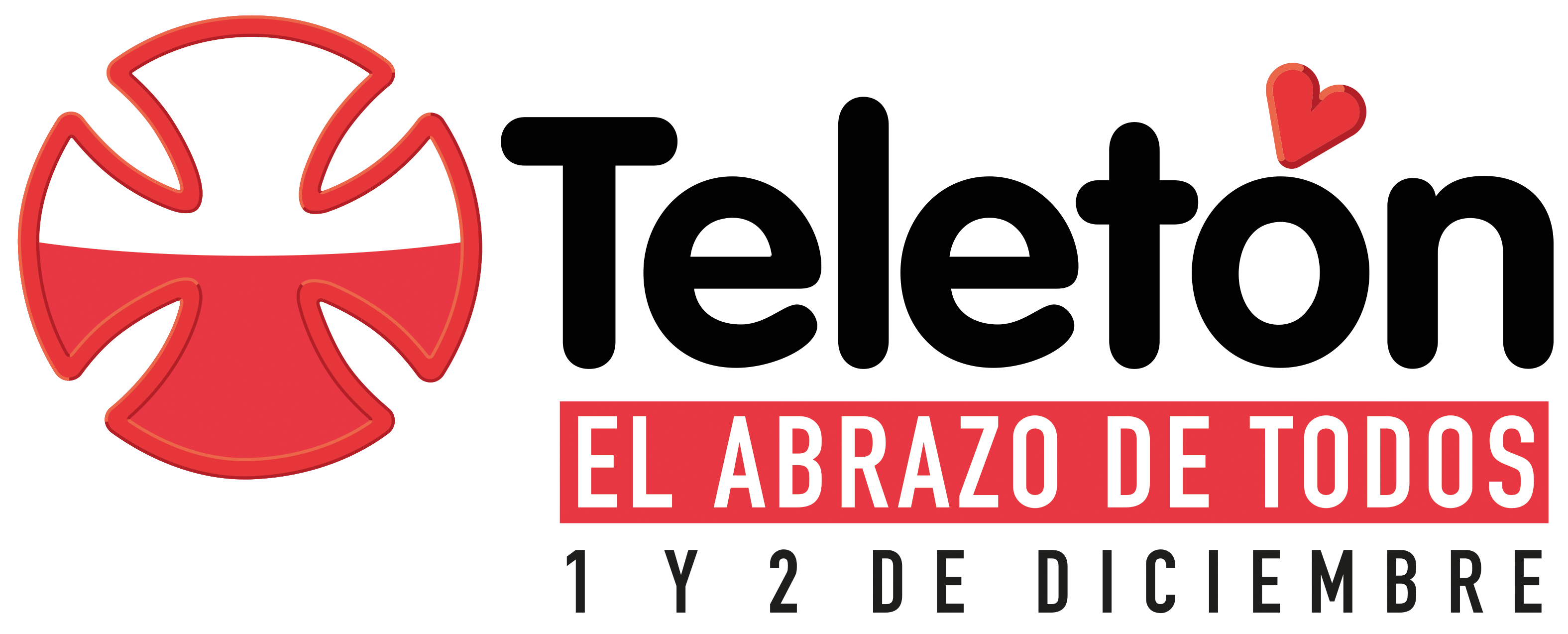 Teletón 2017